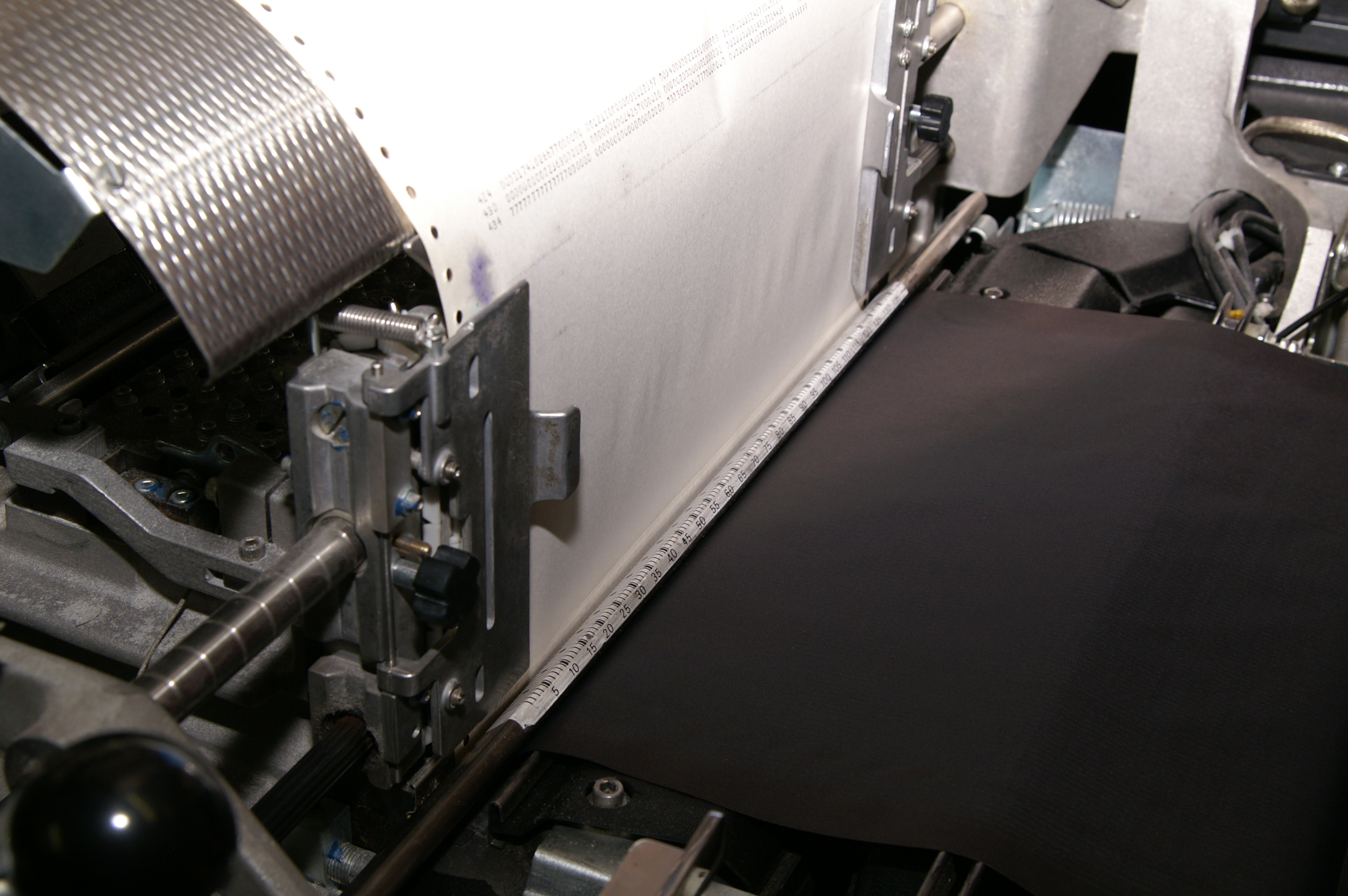 Kettendrucker - Exkursion des Wikipedia-Stammtisches München zur Gesellschaft für historische Rechenanlagen e.V. am 21.01.2007